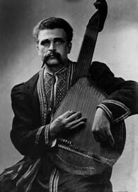 Bandurist H. Bazhul 1946